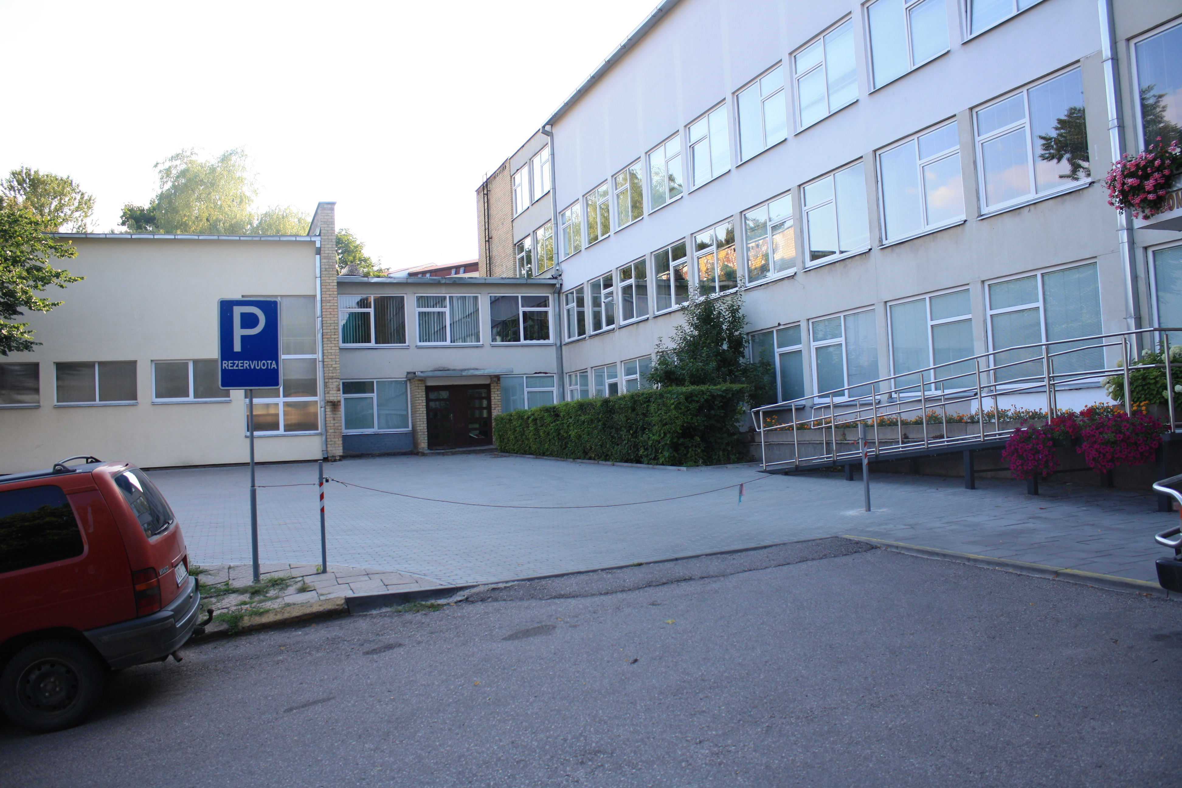 Vilniaus Adomo Mickevičiaus gimnazija